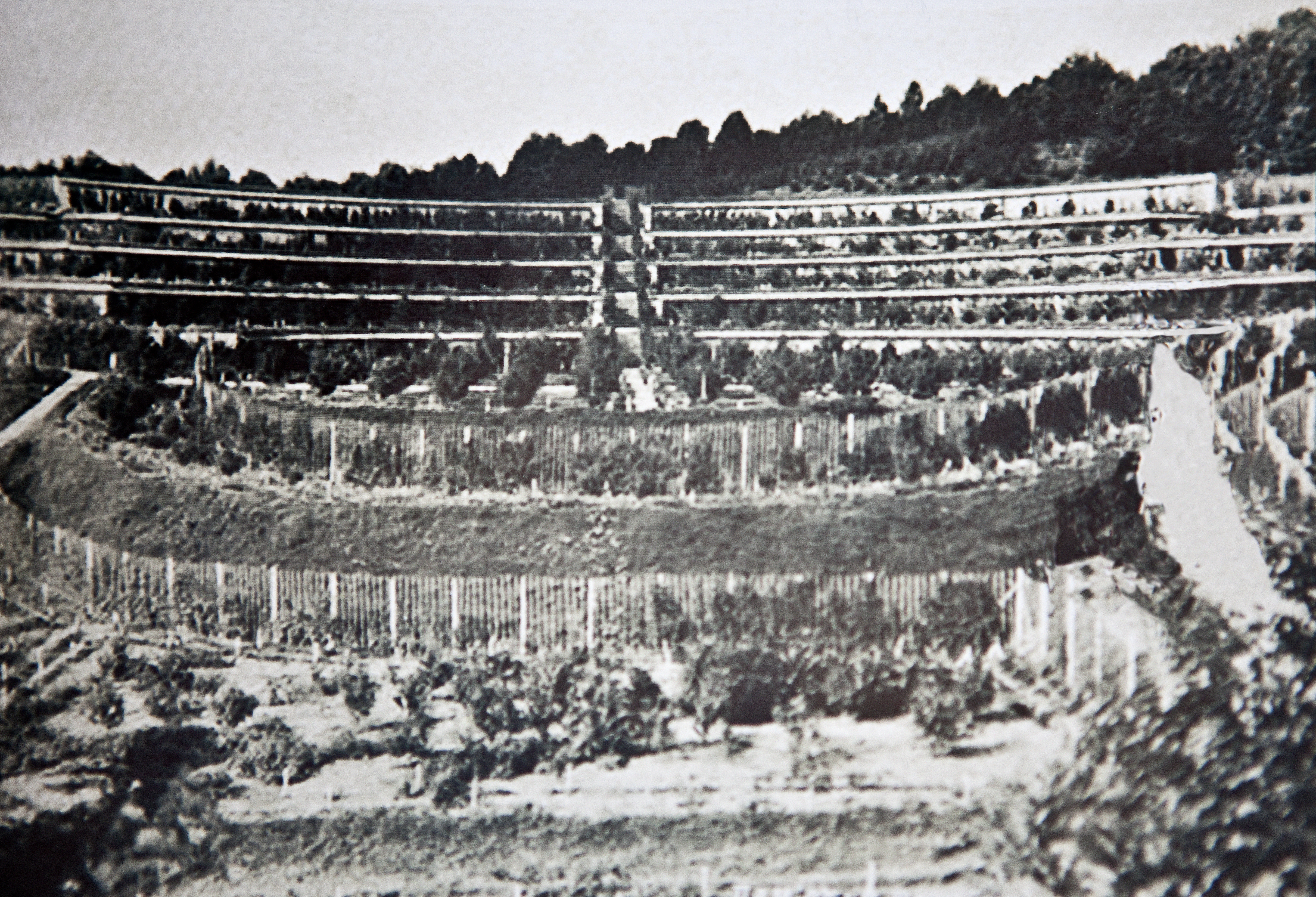 Харківська область, Краснокутський район, с. Городнє, Терасний сад садиби Харитненків, фото приблизно 1950-х років, можливо, навіть перші десятиліття ХХ століття